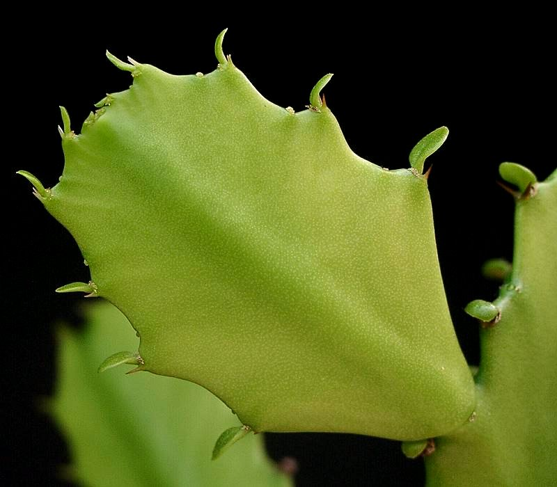 Euphorbia dawei outermost branch